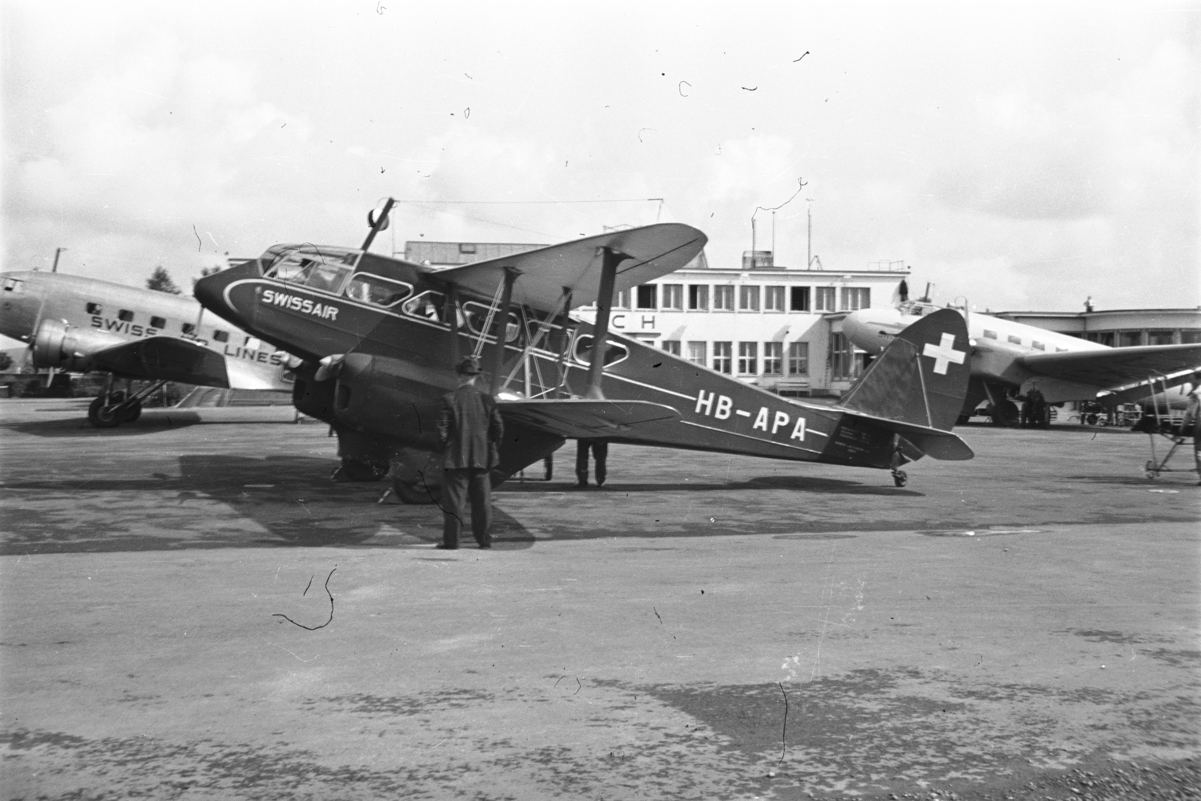 DH Dragon Rapide HB-APA Dübi